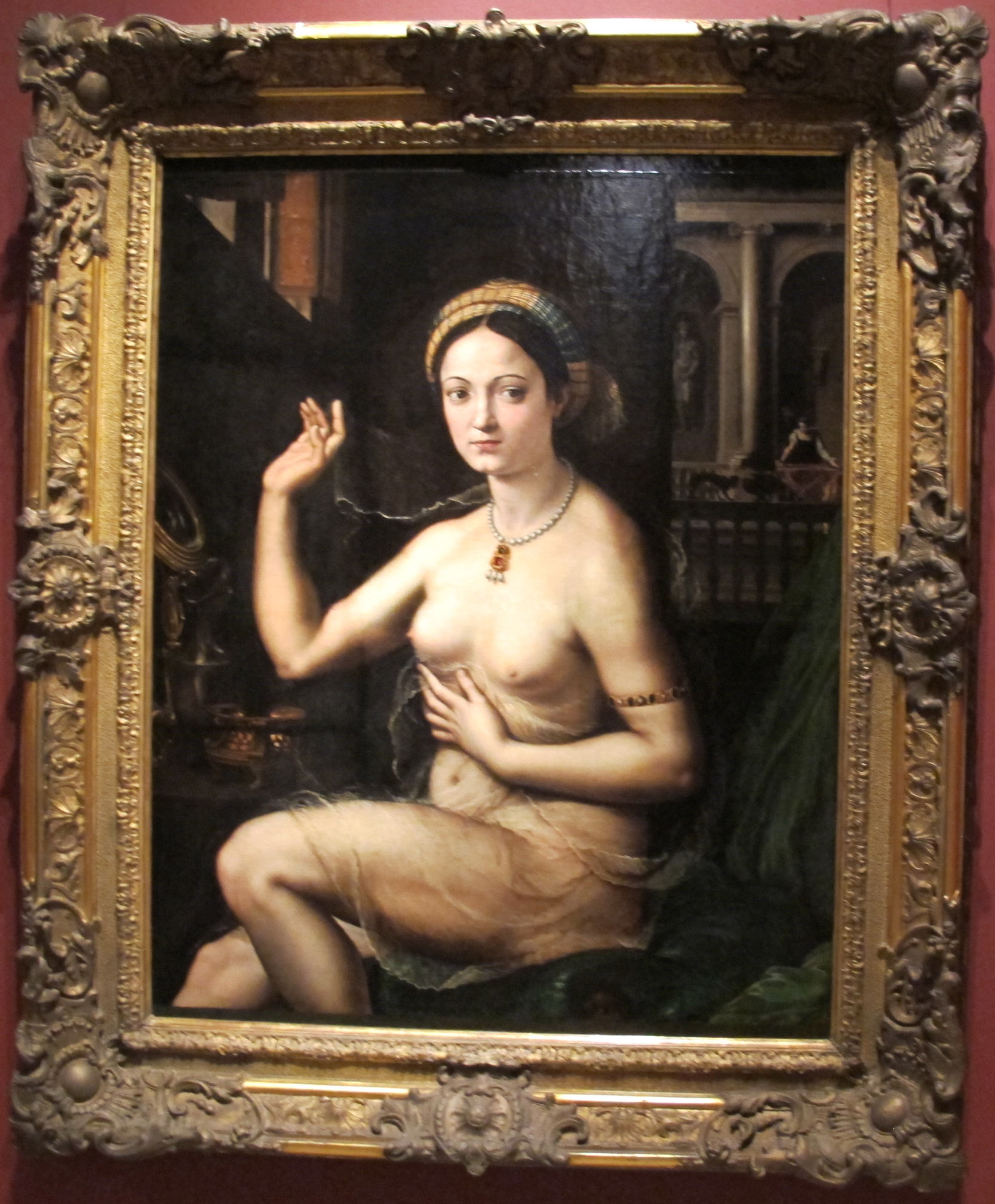 Giulio romano, donna alla toeletta, 1520 ca